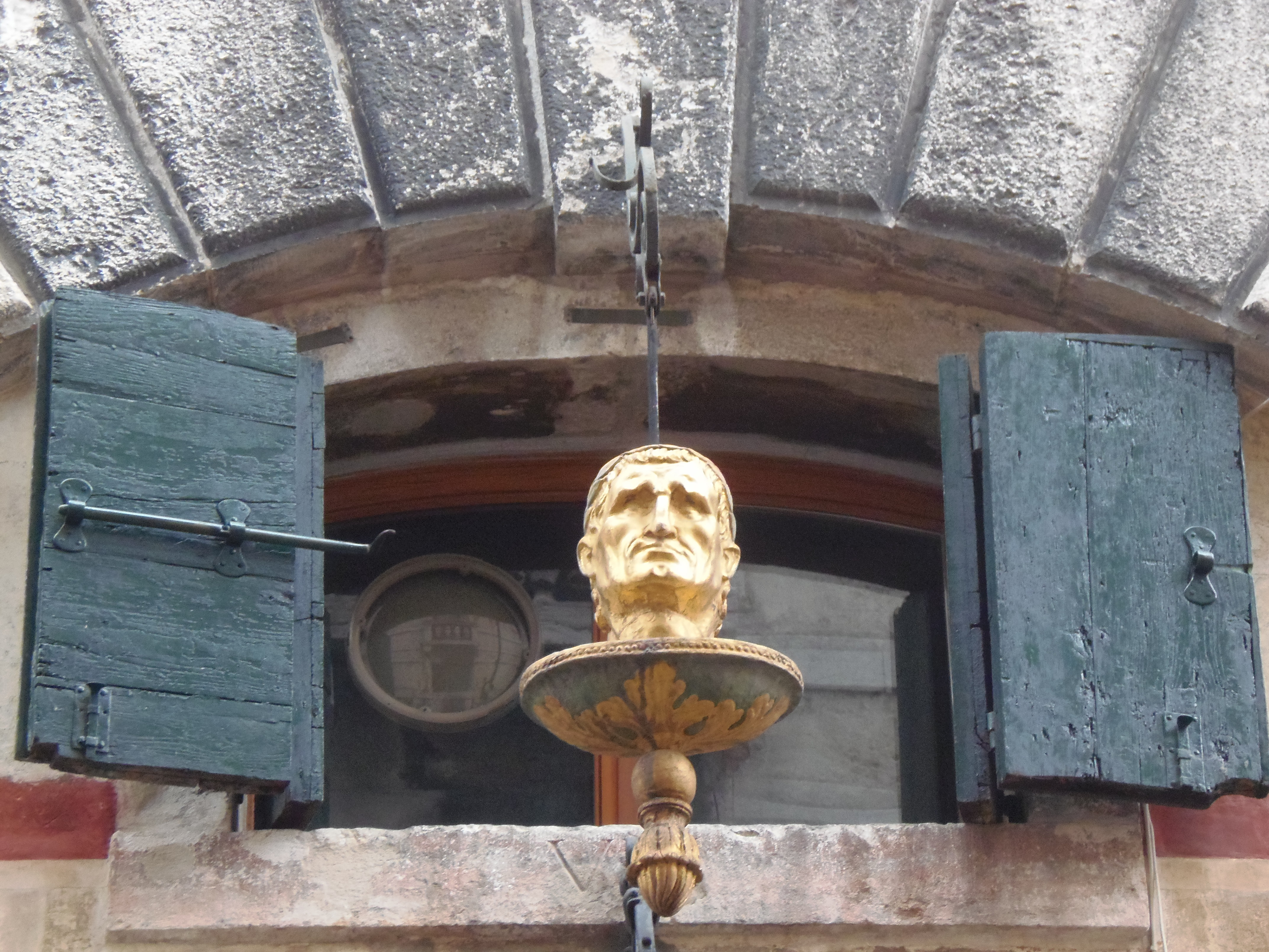 Aranyfej, "Testa d'Oro", gyógyszertári cégér. Velence, 2016. január. Foto: Alessia